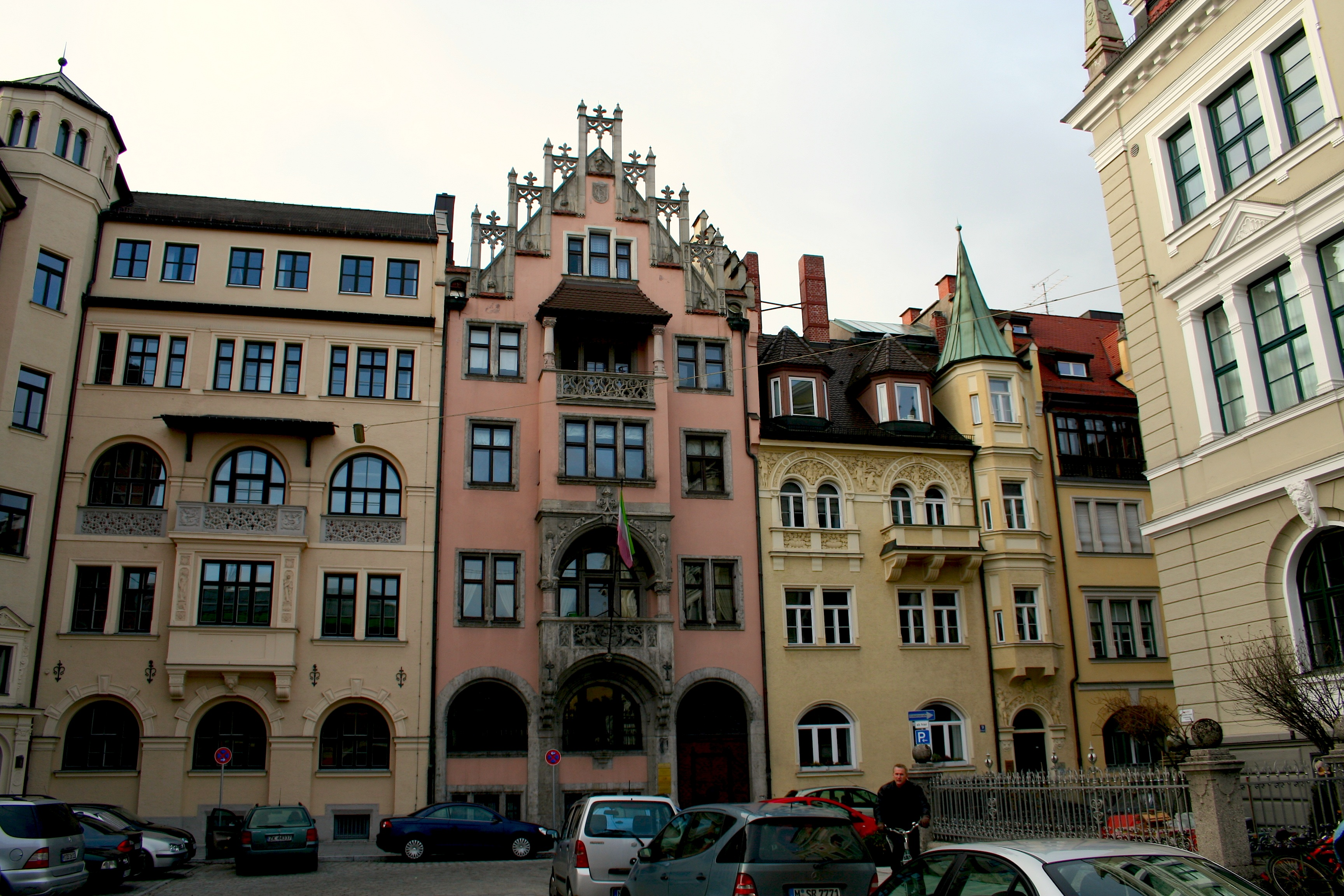 Richard-Wagnerstraße in der Maxvorstadt